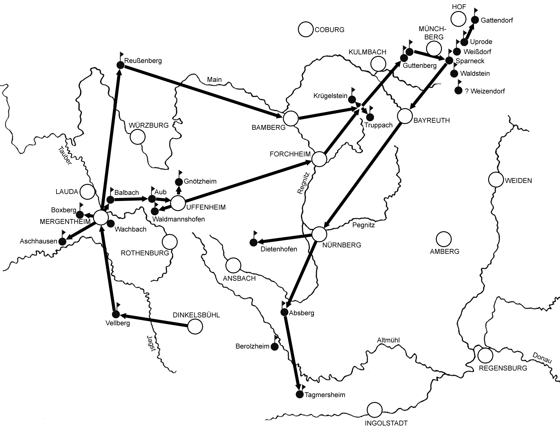 Route des Schwäbischen Bundes bei der Strafexpedition gegen die Unterstützer des Raubritters Hans Thomas von Absberg 1523